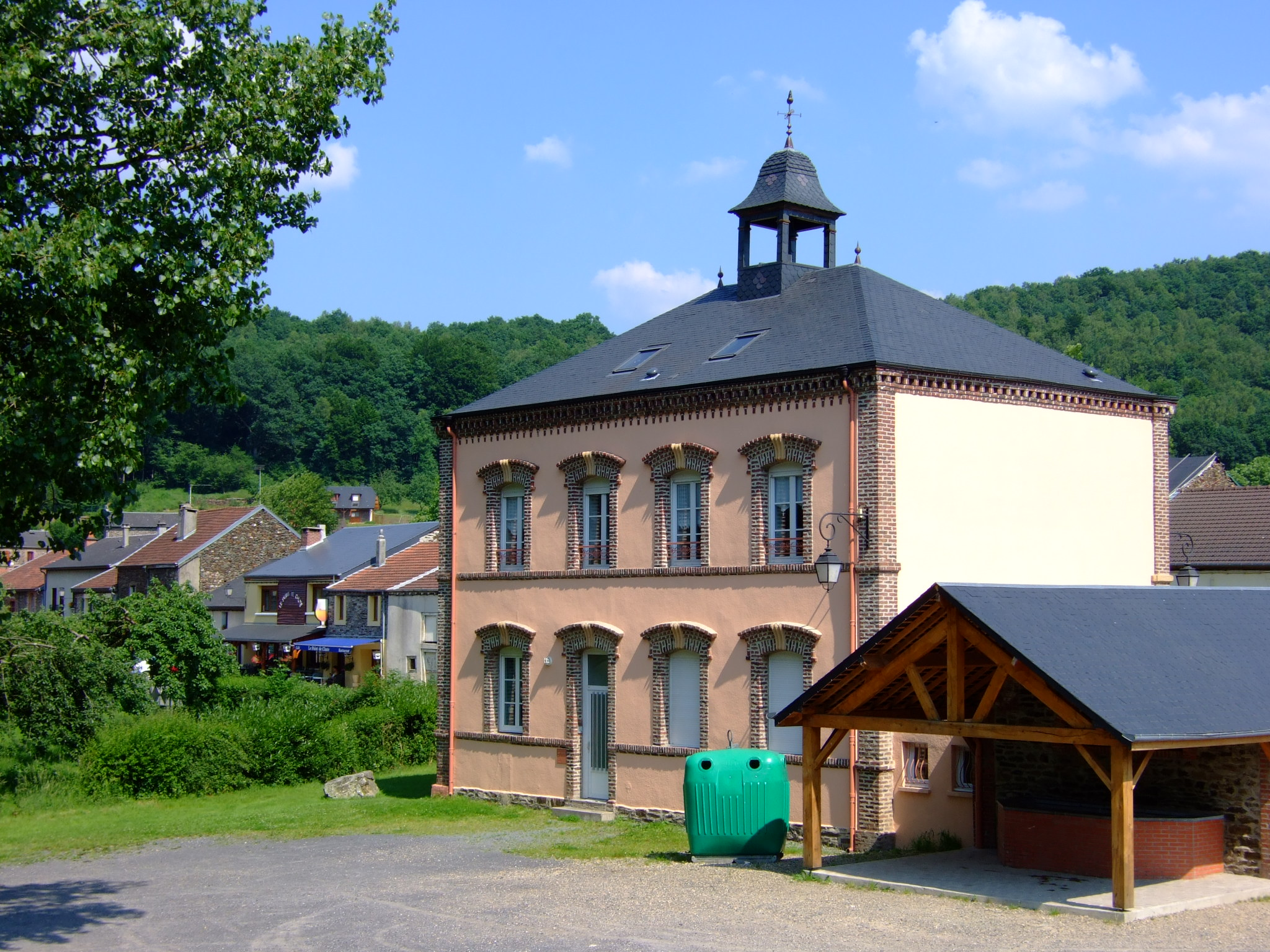 La mairie de Tournavaux